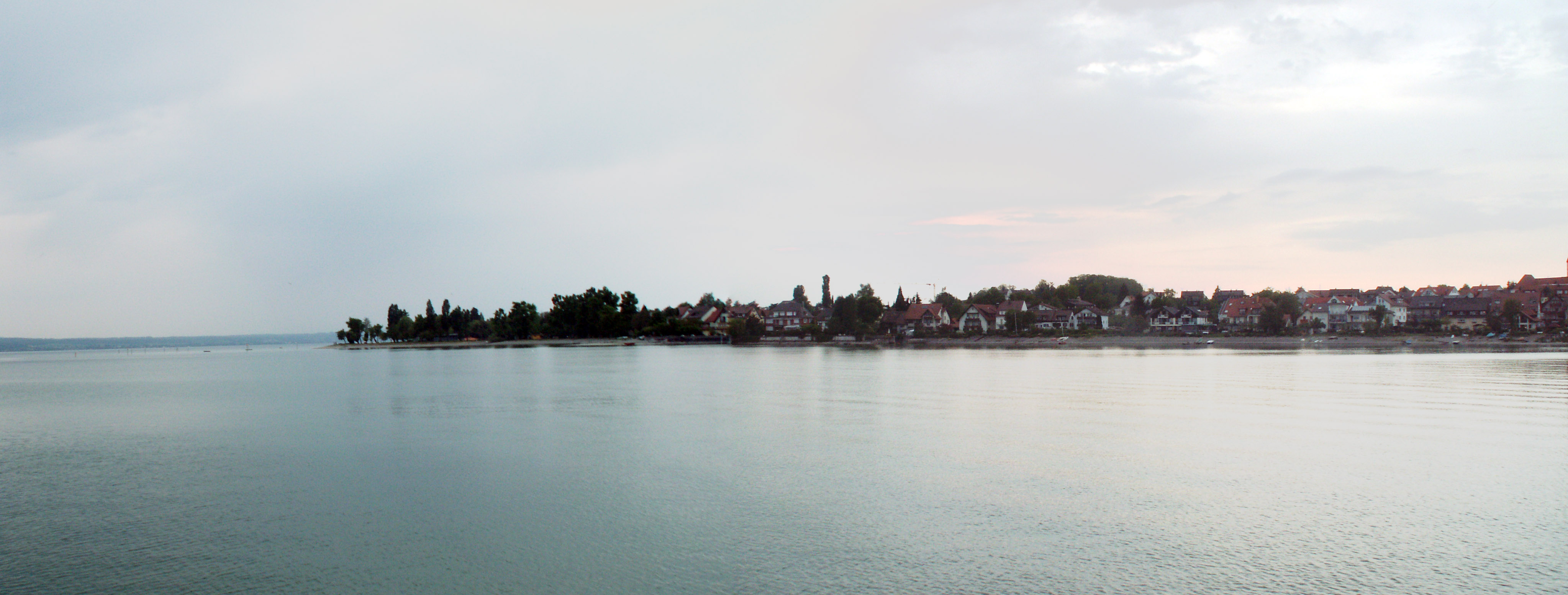 Aufgenommen in Immenstaad am Bodensee.